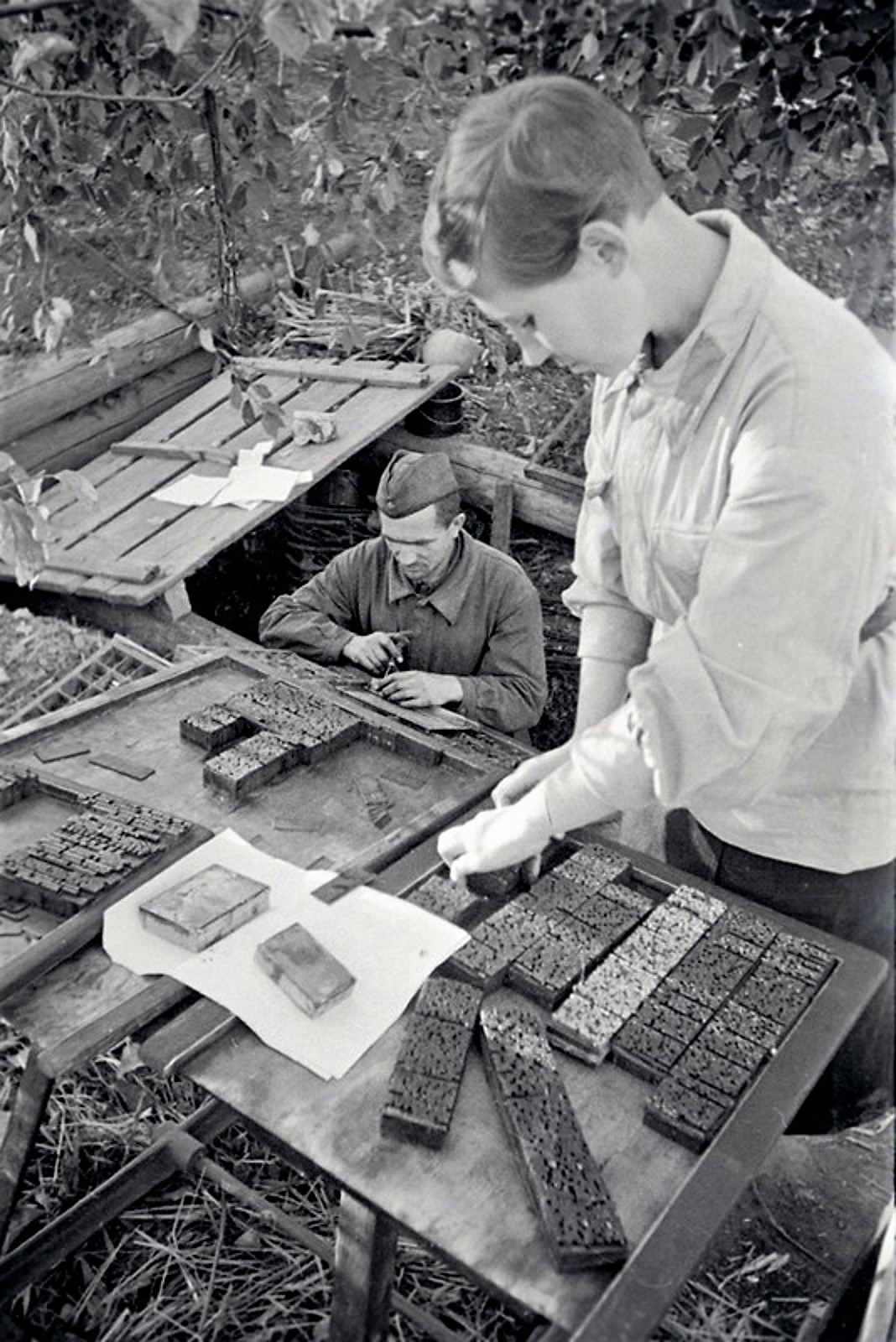 Сотрудники полевой типографии за работой